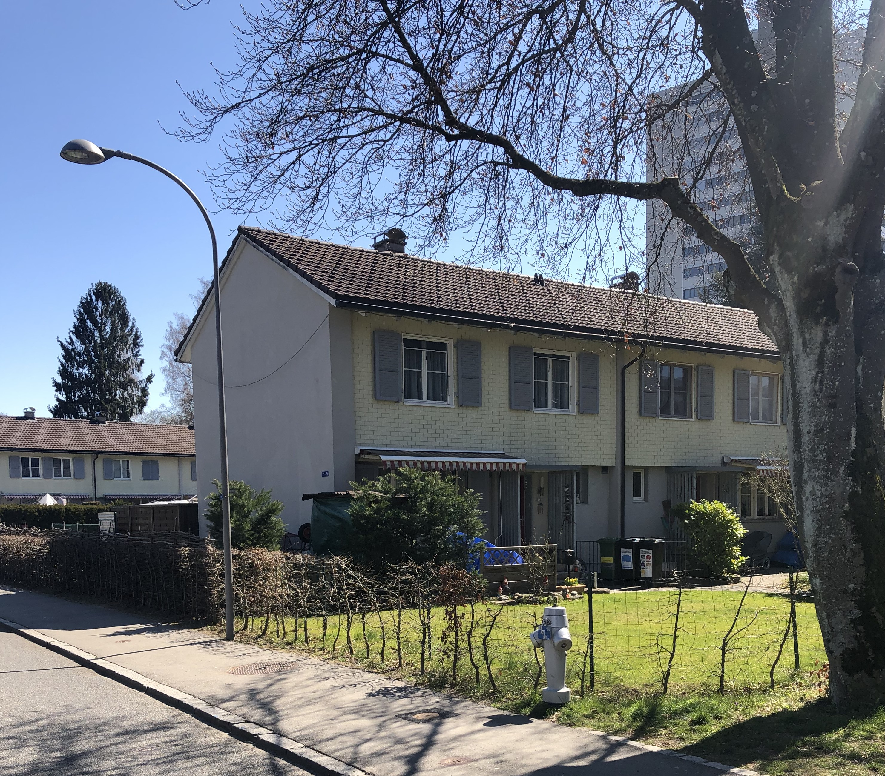 Bethlehemacker Siedlung Mehrfamilienhaus